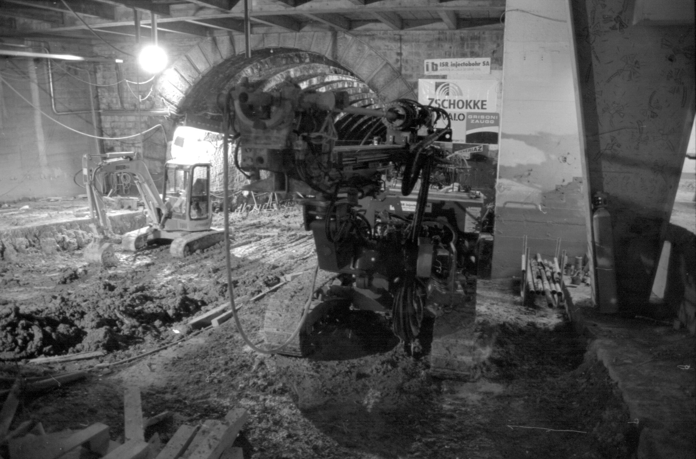 Construction du M2, à l'emplacement de l'ancienne "ficelle"